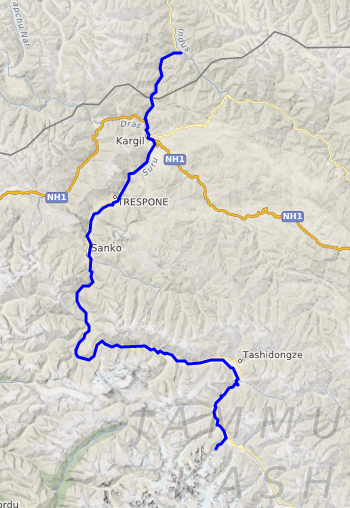 carte réalisée sur umap This map may be incomplete, and may contain errors. Don't rely solely on it for navigation.